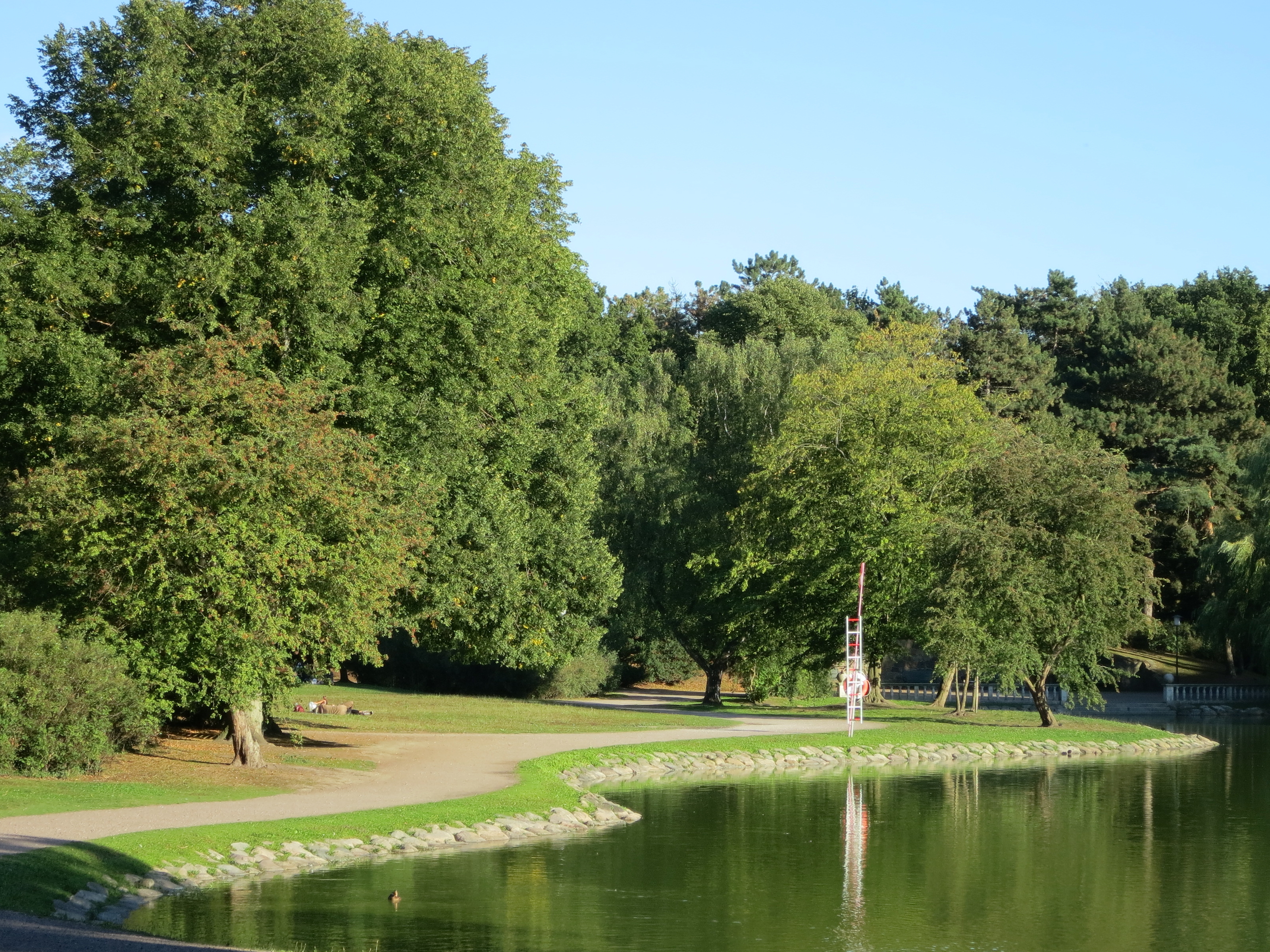 Dammen i Slottsparken i Malmö